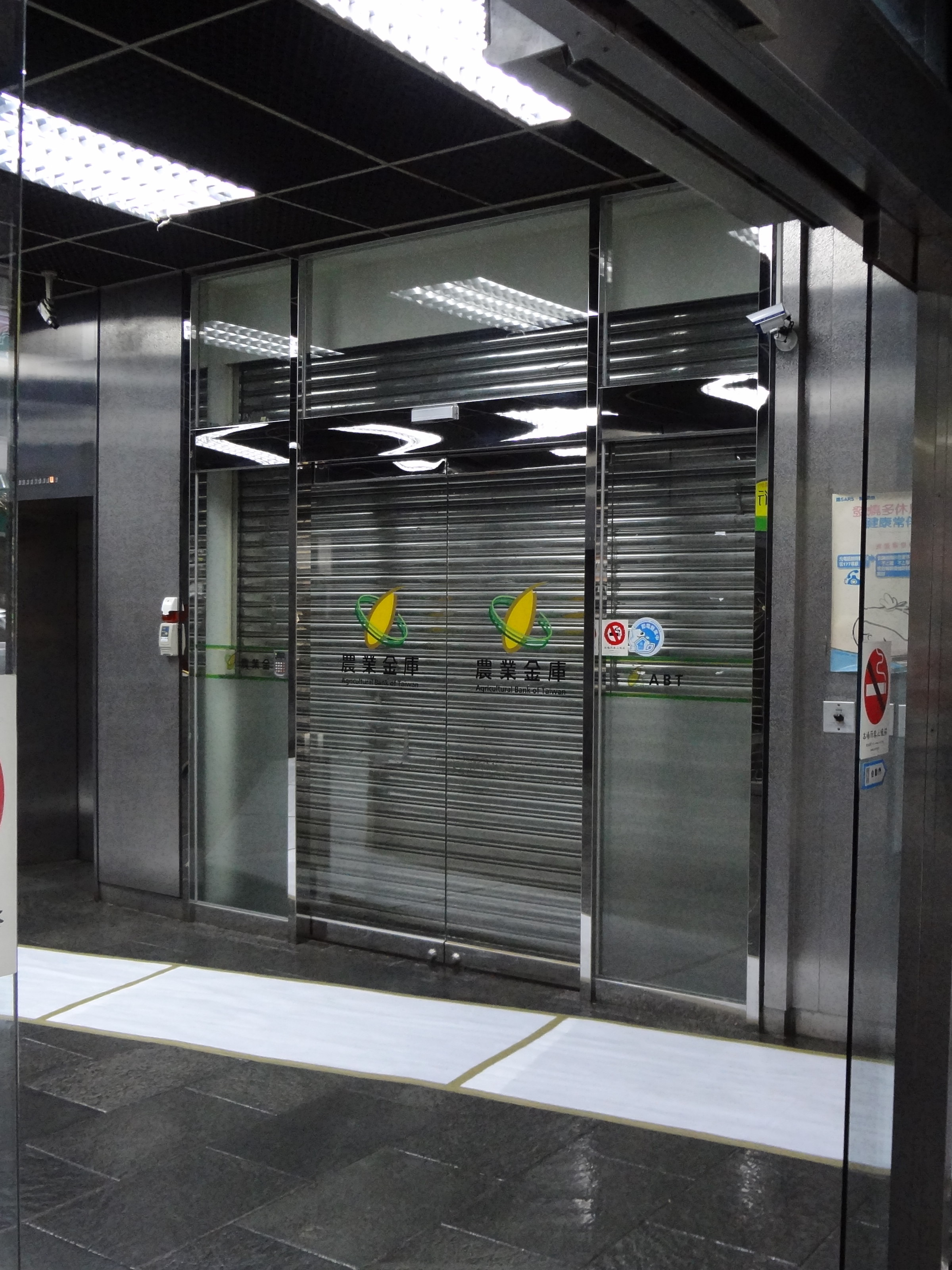 全國農業金庫總部大門，位於館前聯合大樓1樓大廳。